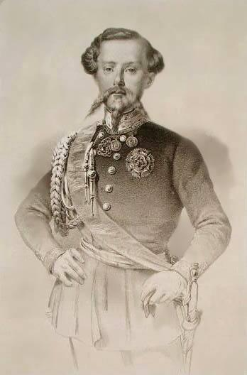 Vittorio Emanuele II, litografia del 1850 ca., firmata F. Perrin, ritoccata.